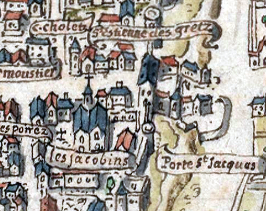 Plan de Paris dit plan de la Tapisserie ou Bonnardot (détail, porte Saint-Jacques de l'enceinte de Philippe-Auguste avec le couvent des Jacobins sur la rue Saint-Jacques)